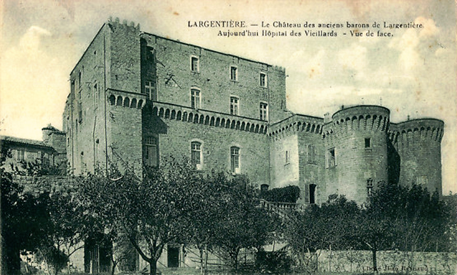 Chateau devenu hopital